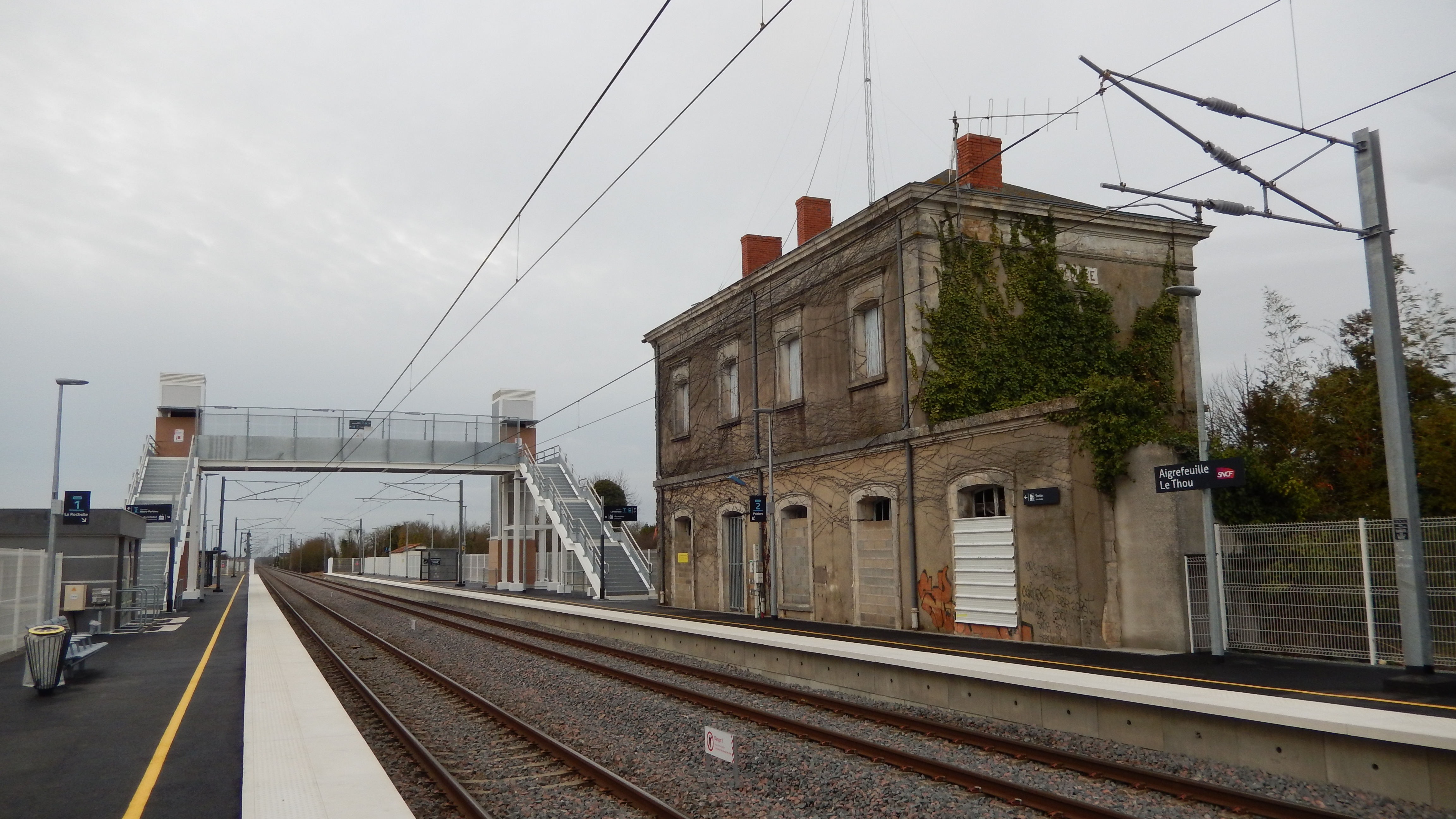 Les quais de la gare SNCF d'Aigrefeuille - Le Thou (Charente-Maritime, France). À gauche, le quai en direction de La Rochelle ; à droite, le quai en direction de Niort et Poitiers.